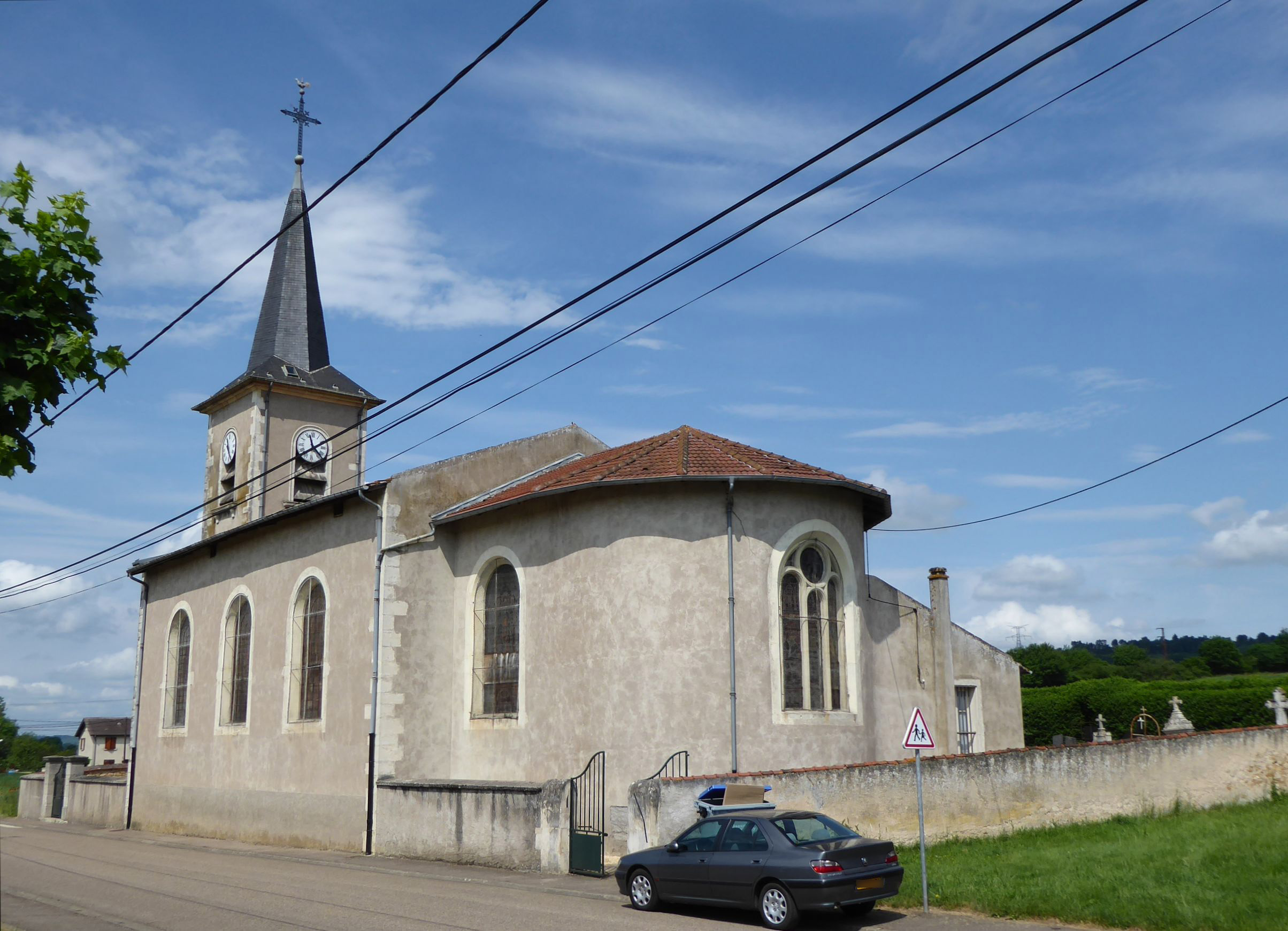 Face sud de l'église de Montenoy en Meurthe-et-Moselle (France).